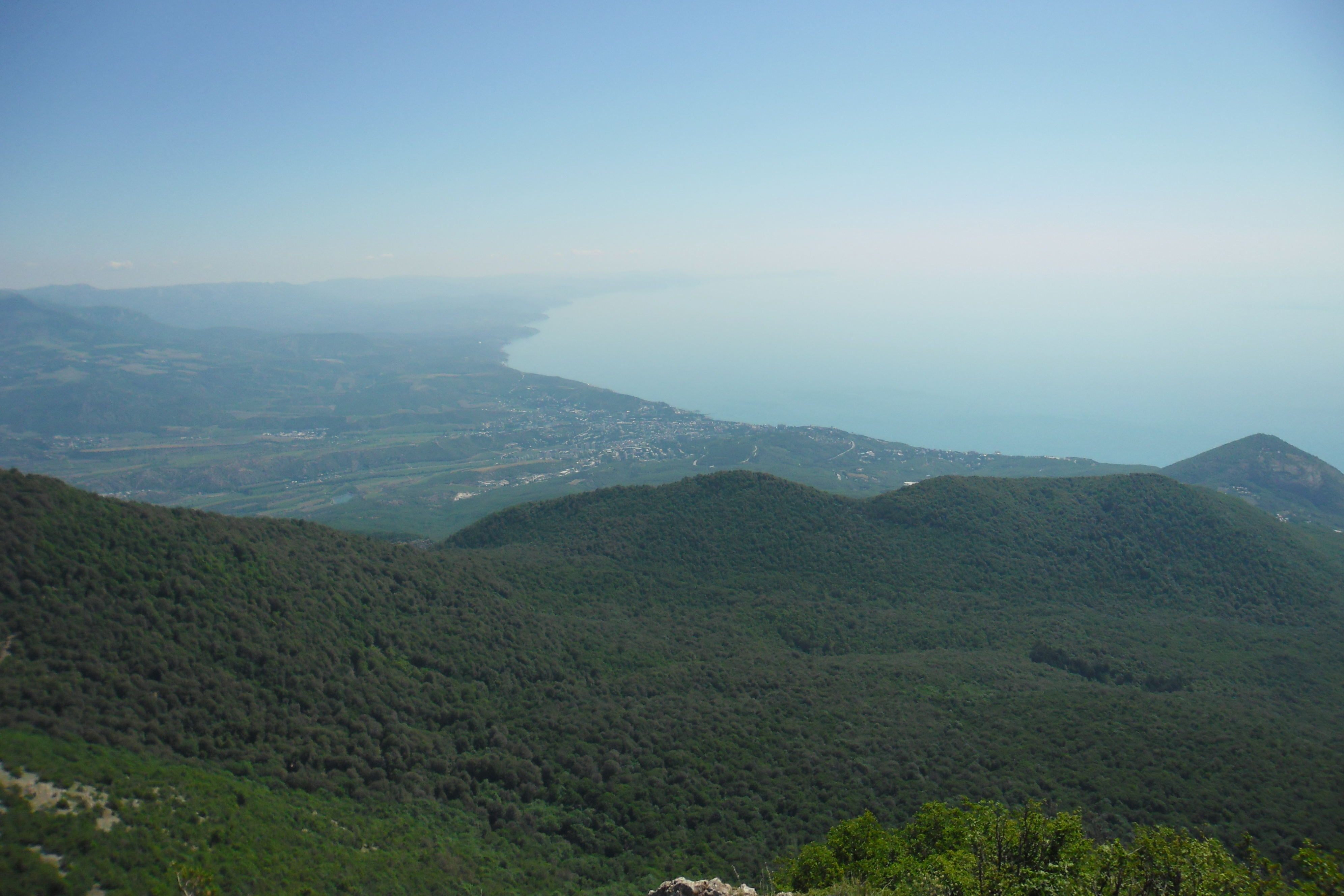 Хребет_Урага1: Фото